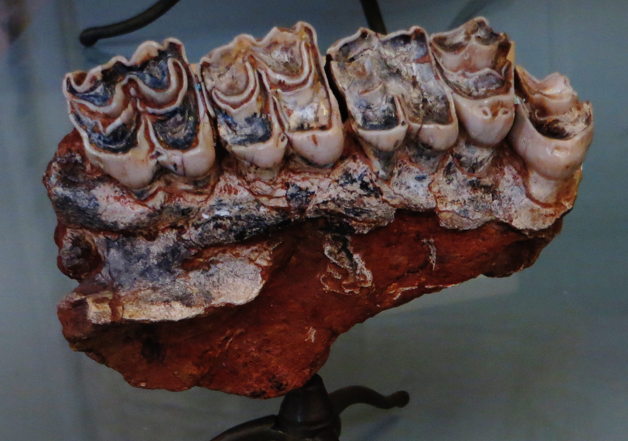 Fossil of Palaeotragus, an extinct mammal- Took the photo at Musee d'Histoire Naturelle, Paris